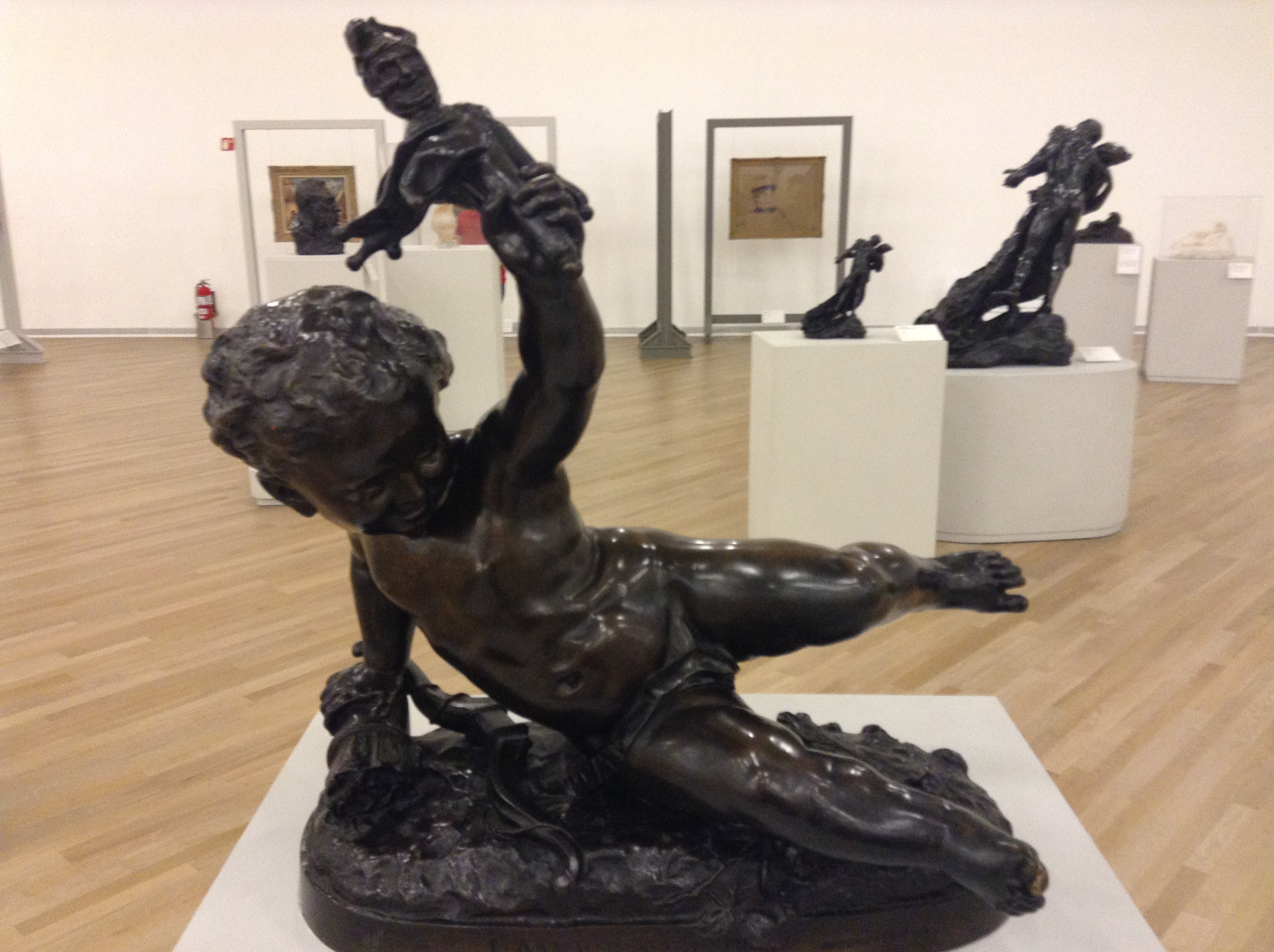 La obra "L'amour à la folie", bronce con patina café oscuro y café, de Jean Baptiste Carpeaux, expuesta en el museo Soumaya, México.